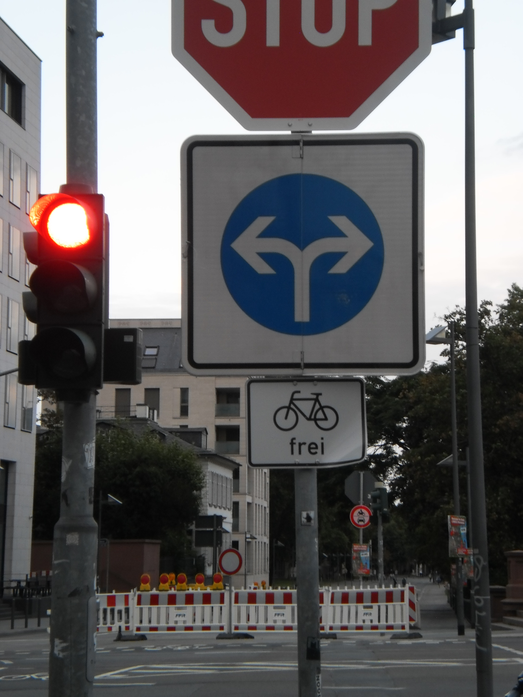 Am für Radverkehr und flanierende Fussgänger*innen freigegebenen ab Anfang August 2019 autofreien Mainkai in Frankfurt ist neben der Straßensperre an der Untermainbrücke ein blau-weisses Abbiegegebot für Kfz aufgestellt. Für Menschen die auf Fahrrädern ebenfalls vom Untermainkai am nördlichen Mainufer weiter nach Osten in die Frankfurter Altstadt (Dom, Eiserner Steg) fahren wollen ist die Fahrt über die Uferpromenade mit Zusatzzeichen "Fahrradfahrer frei!" hier an der Kreuzung freigegeben. Die zwei weissen Pfeile auf dem blauen Hintergrund besagen: Nach rechts kann hier über die Untermainbrücke in das Stadtgebiet südlich des Mains (Sachsenhausen), nach links in die Innenstadt auf dem nördlichen Mainufer abgebogen werden, geradeaus geht es für Kfz nicht. Eine auf der anderen Strassenseite wie eine Barrikade gegen den Autoverkehr wirkende Strassensperre sieht allerdings auch etwas abschreckend und wenig einladend für nichtmotorisierte Verkehrsteilnehmer*innen aus, ein nett buntes Transparent hinter der Sperre mit zum Flanieren einladender Thematik könnte hier diese Pforte etwas freundlicher gestalten. Auch ein roter Teppich über die Kreuzung für den Radverkehr und eine klar zu erkennende torartige Einfahrt fehlen zu diesem Zeitpunkt, es dominiert das Stopschild im Bild vom 13. August 2019 in Frankfurt (weitere Bilder).